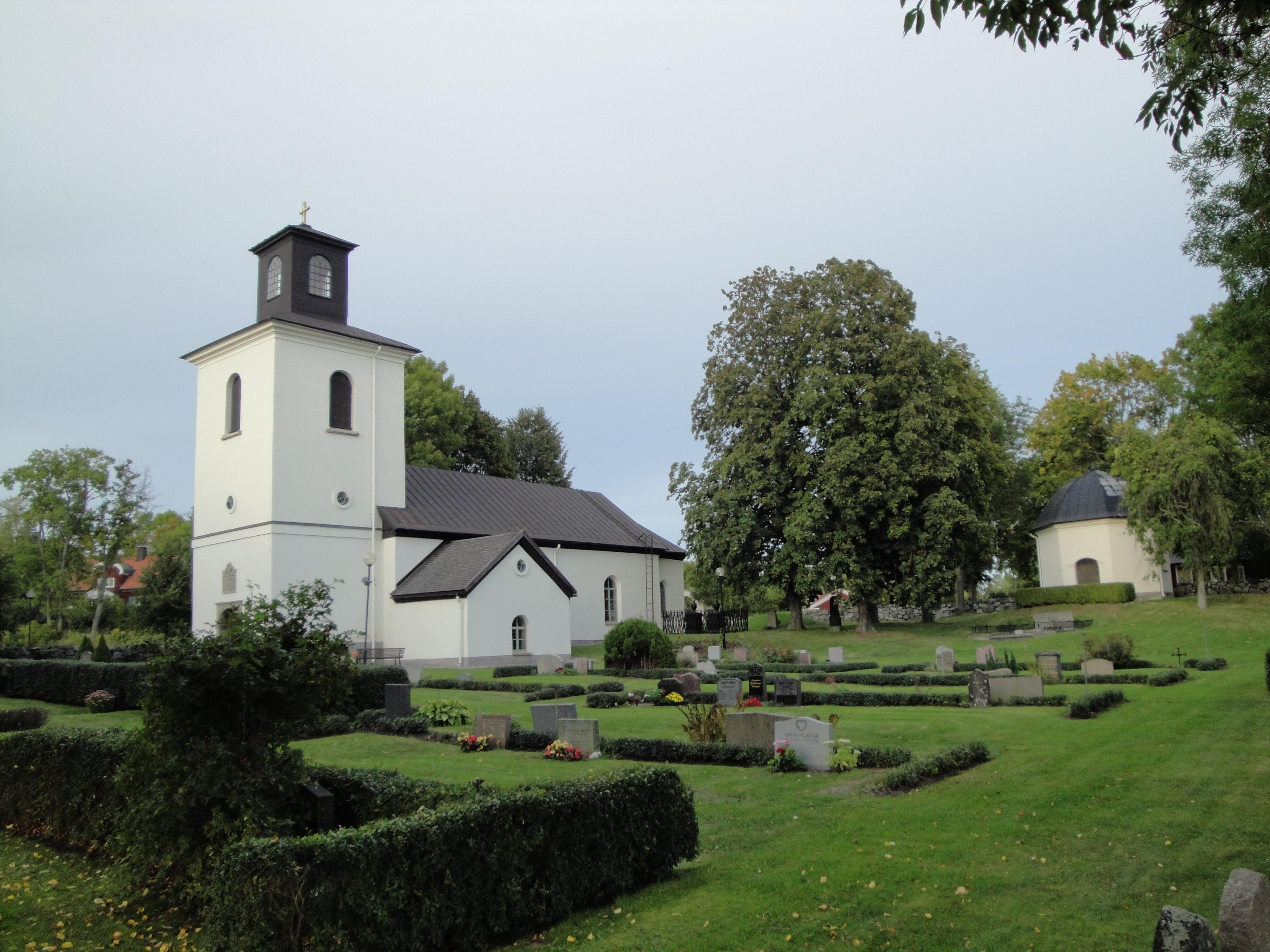 Låssa kyrka i Uppland.